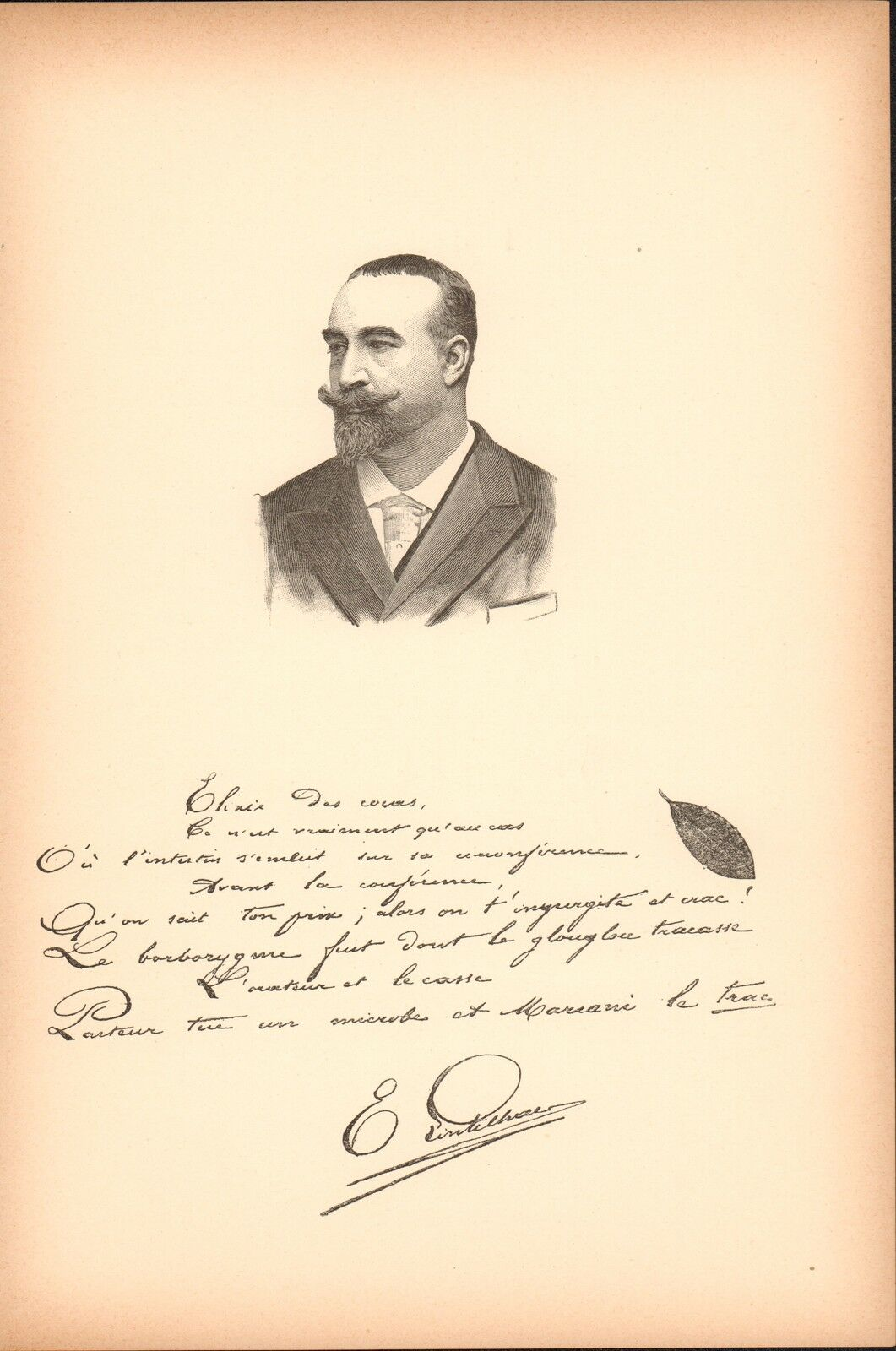 Portrait d'Eugène Lintilhac avec autographe. Professeur de littérature, sénateur du Cantal, félibrige.